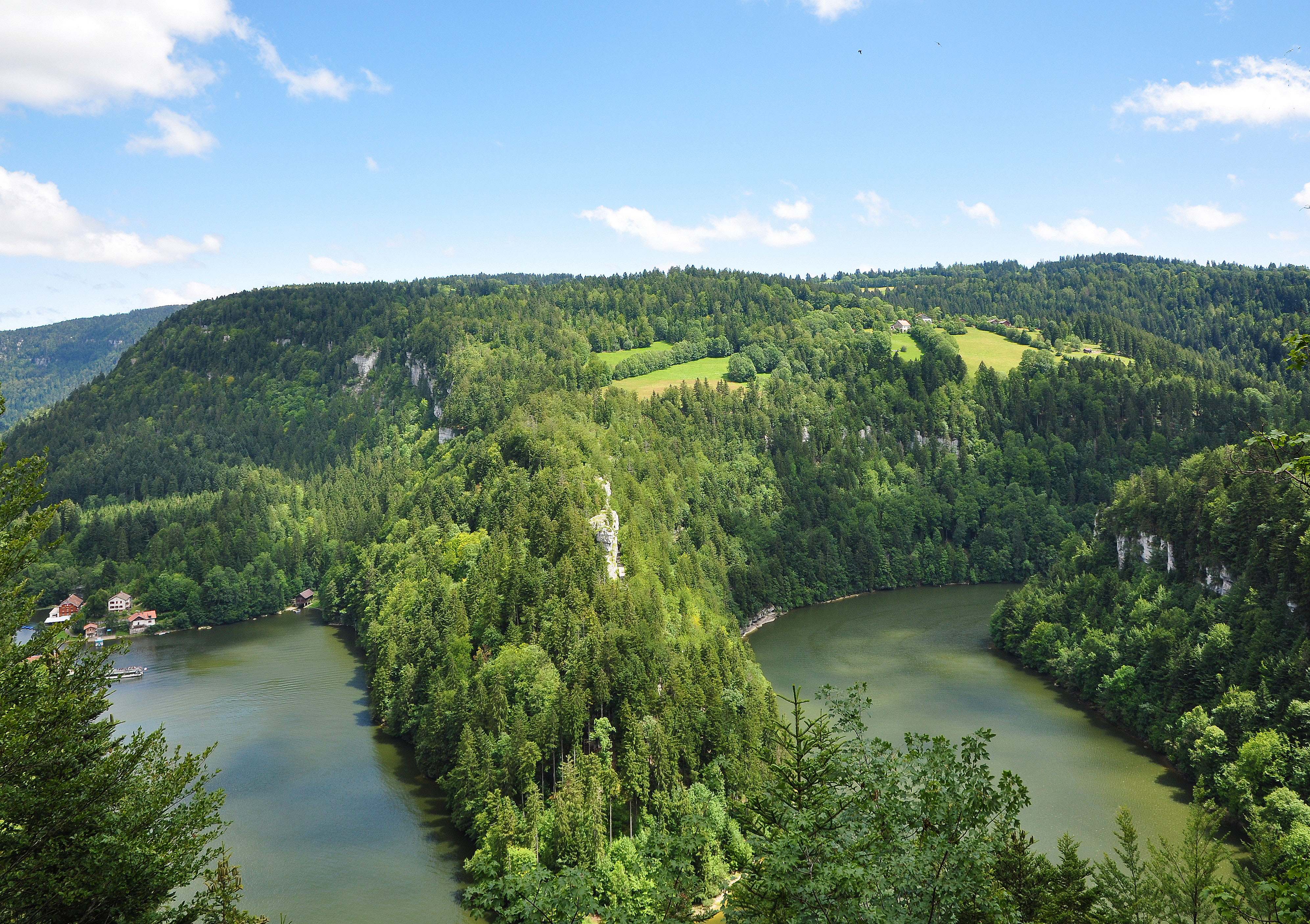 Le Doubs vu du coté français.